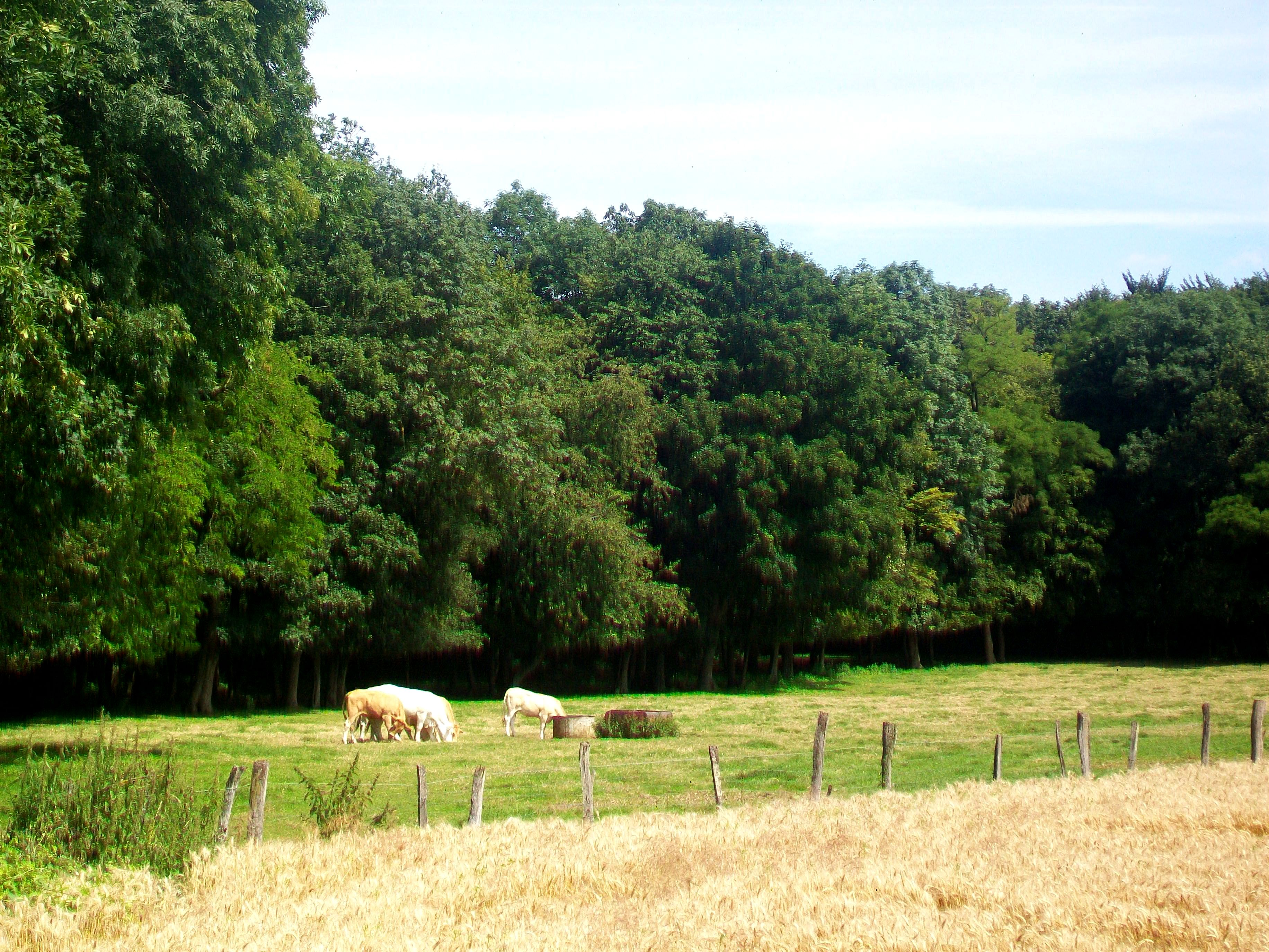 Vaches en bordure de forêt près de Liancourt.